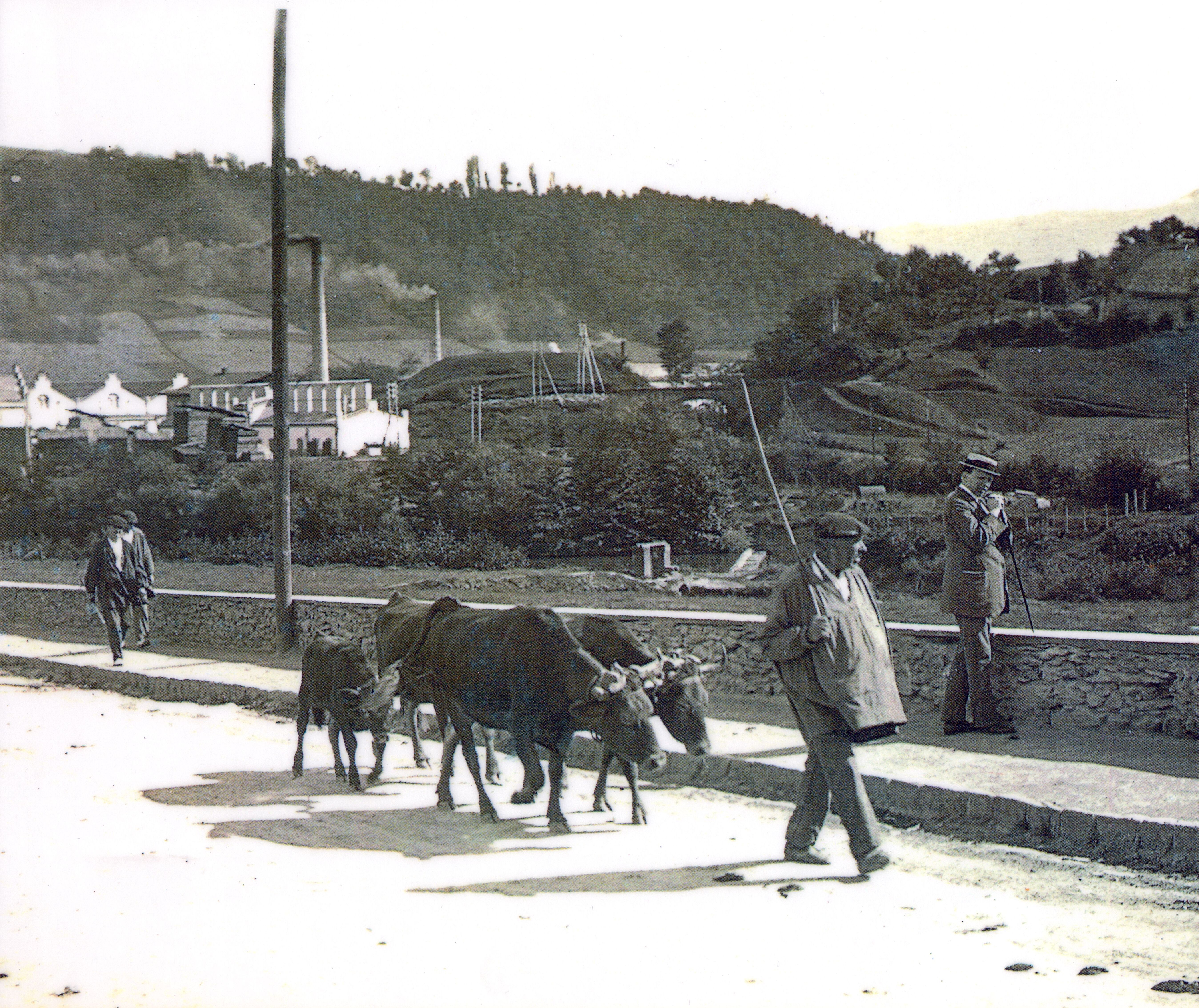 Amarako argazkiak 1900-9050